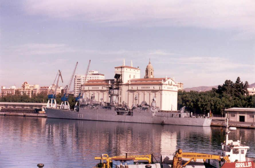 La fragata Cataluña (F 73), es la primera unidad de la clase Baleares en darse de baja en el 2005; fue hundida 2 años mas tarde en un ejercicio de tiro al blanco.